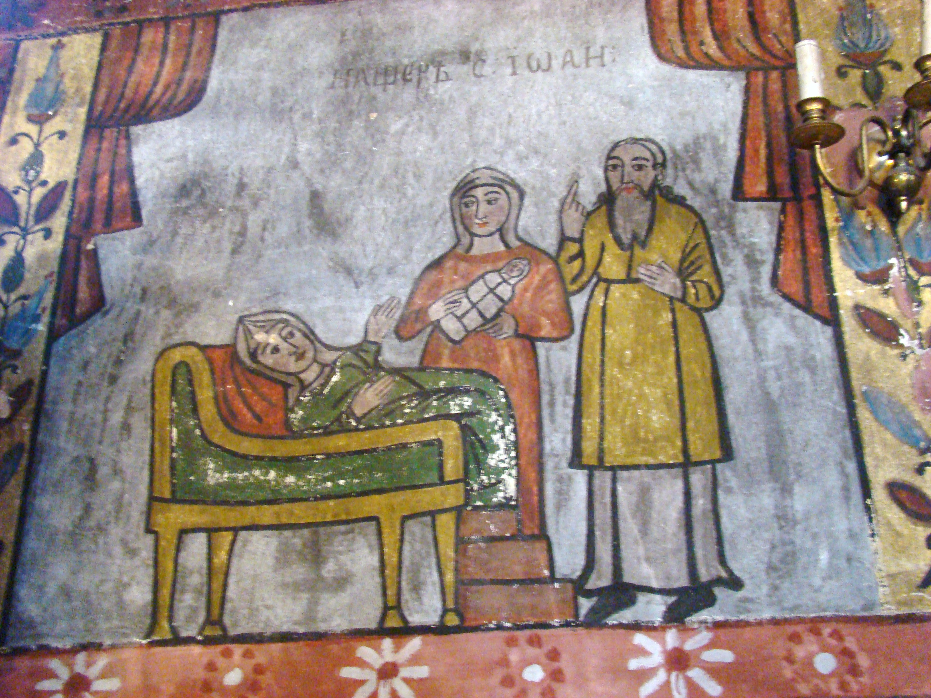 Biserica din Homorog, Bihor